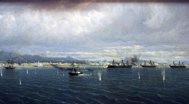 El lienzo representa el bombardeo de los Fuertes que protegían el Puerto de El Callao por los buques de la Armada Española, y en el centro del lienzo aparece la fragata blindada Numancia.